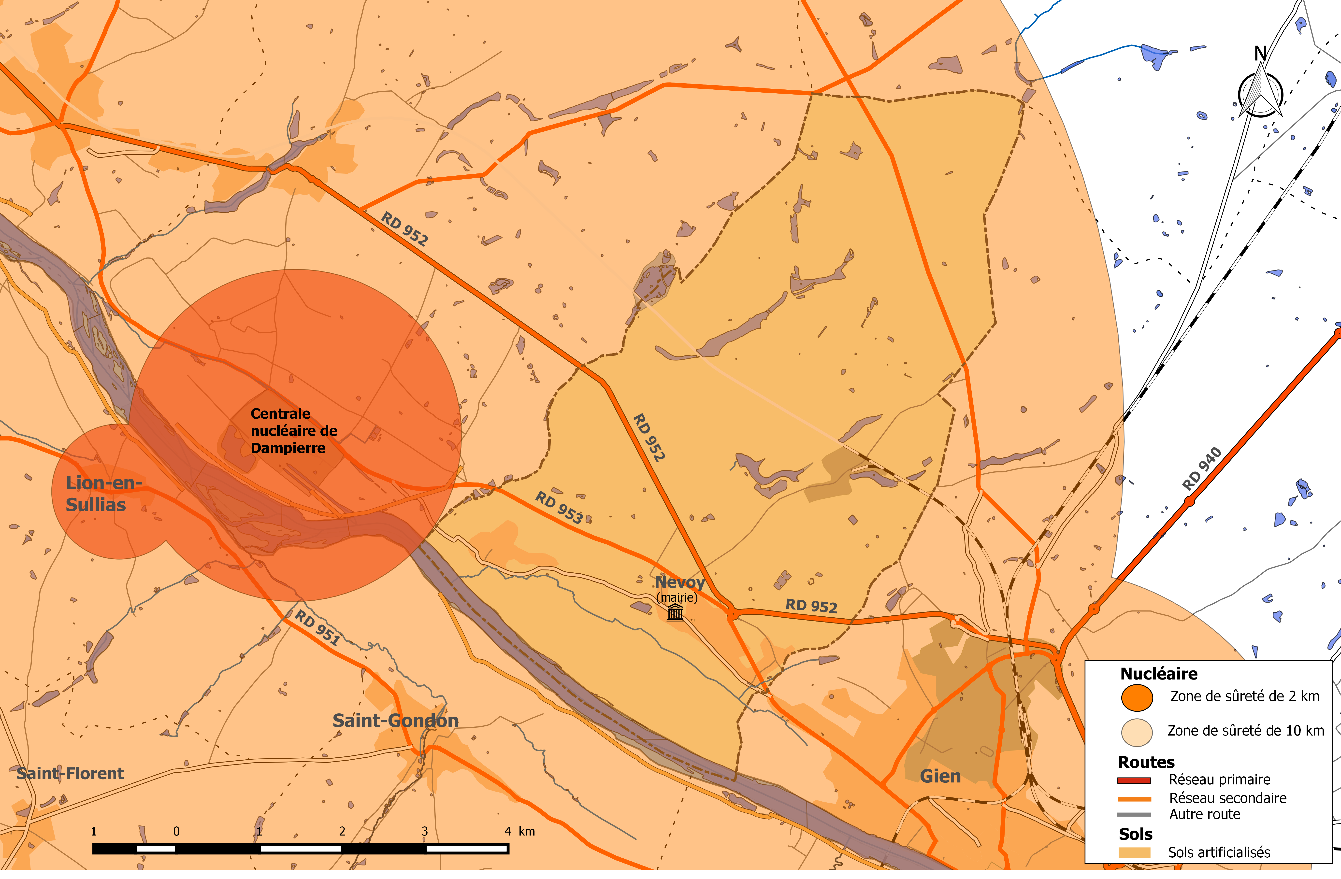 Zones de sûreté nucléaires 2 km et 10 km autour de la centrale de Dampierre - commune de Nevoy